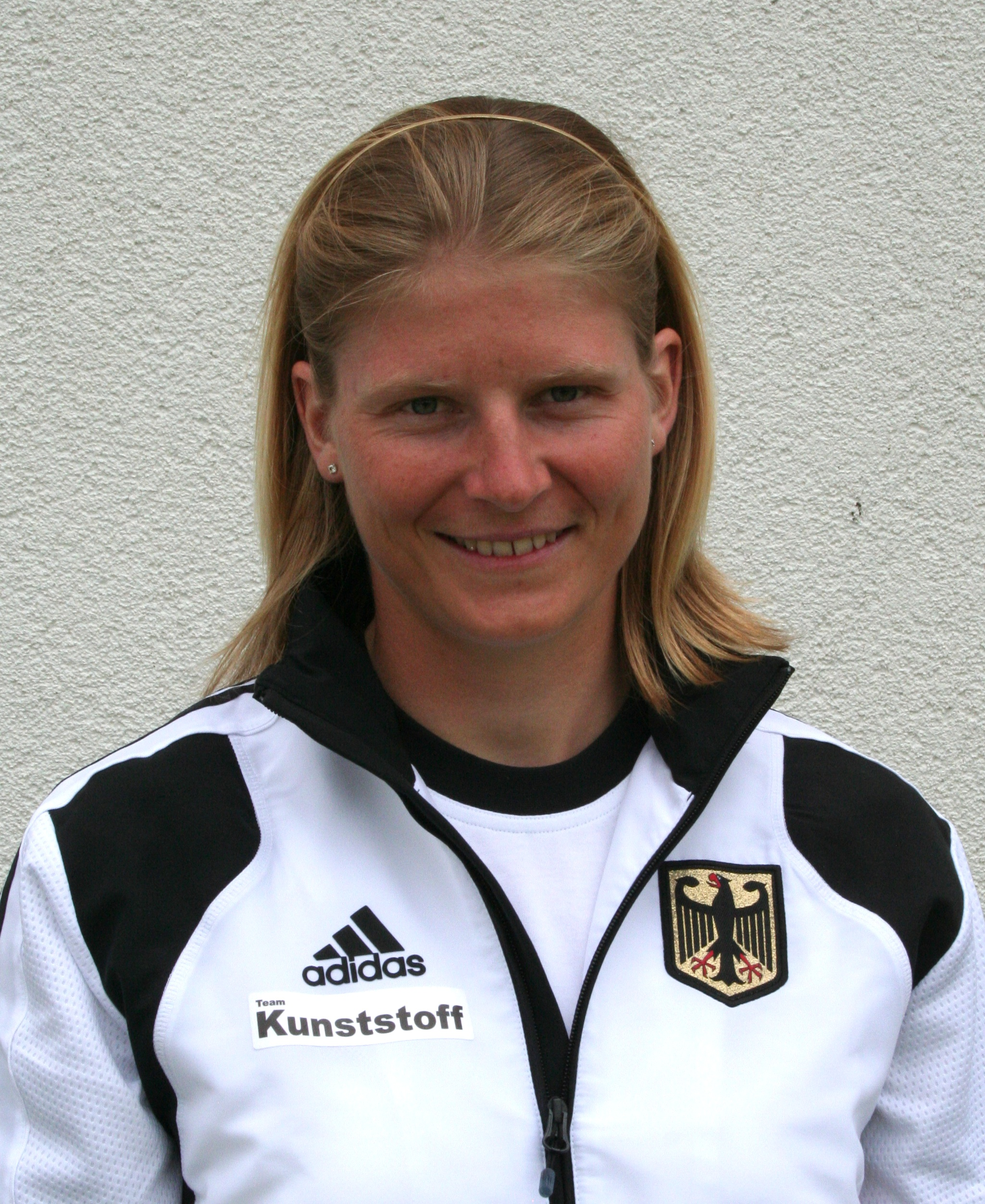 Deutsche Kanu-Rennsportlerin und Weltmeisterin im Jahr 2007 im Zweier-Kajak 1.000m